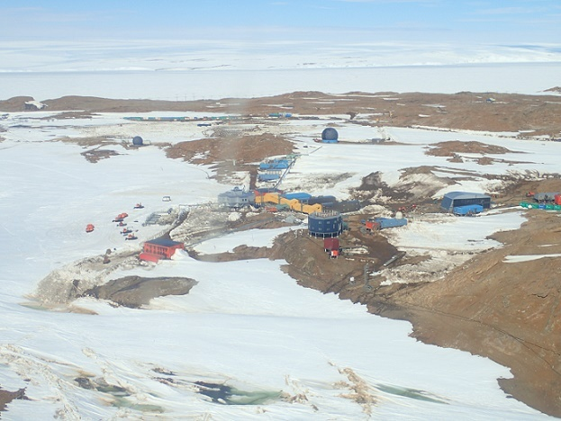 ヘリコプターから撮影した昭和基地の空中写真